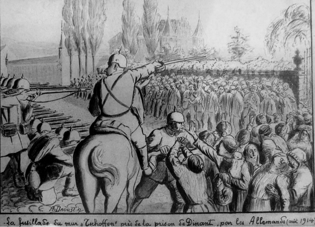 Evocation de la fusillade du mur Tschoffen lors du sac de Dinant en août 1914.